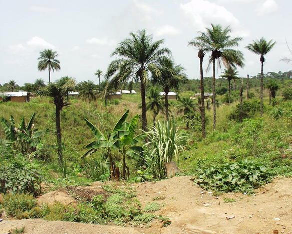 Sefadu, Sierra Leone